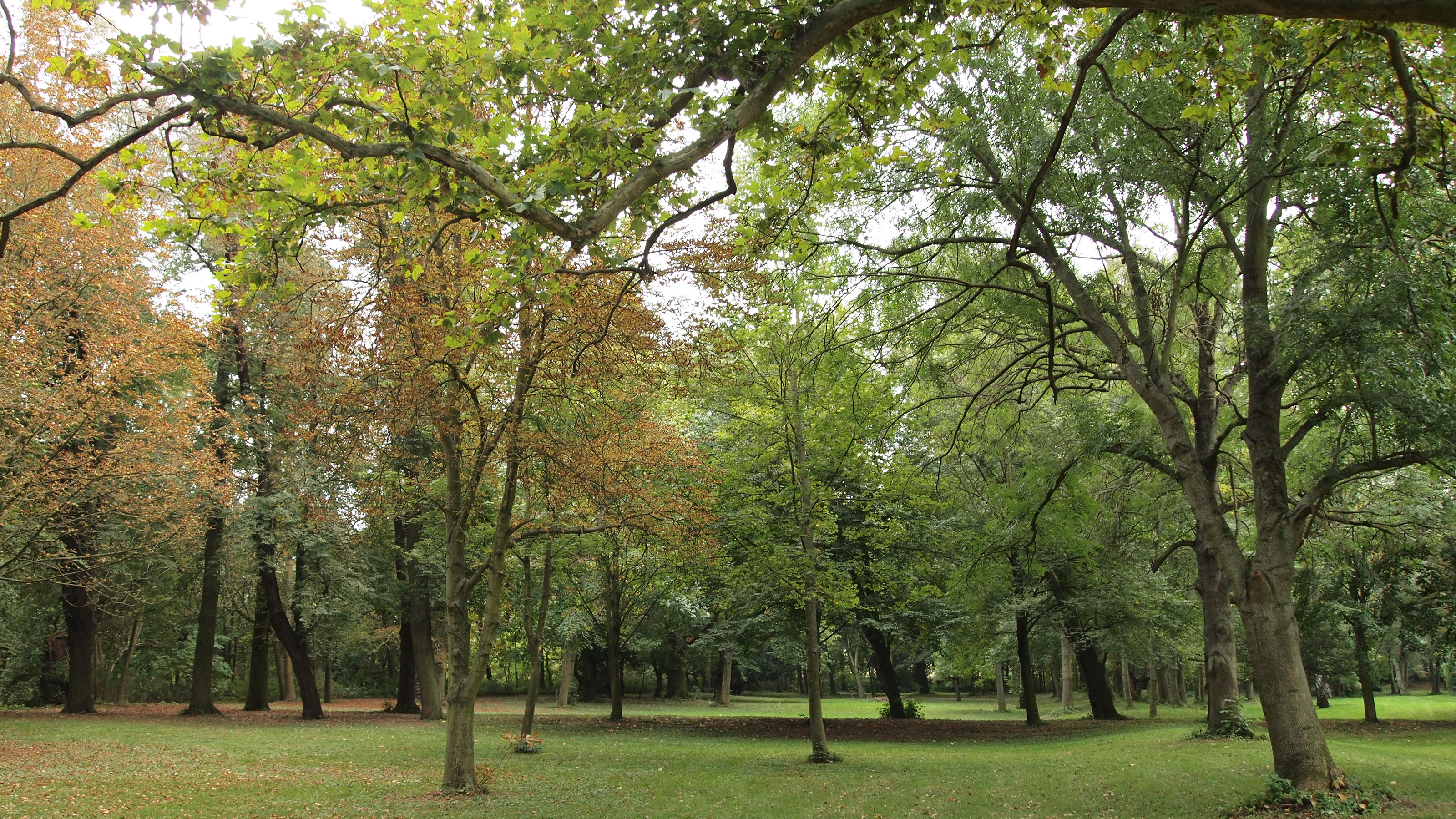 Alter Baumbestand im Schlosspark Kalbsrieth